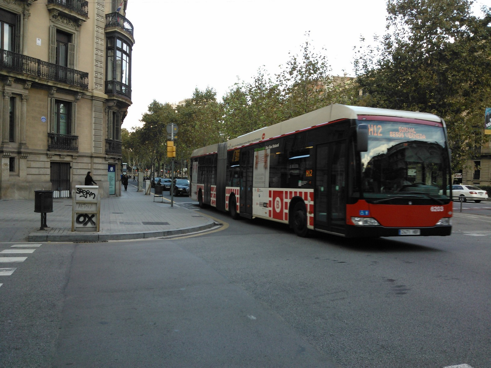 Autobús urbà de Barcelona